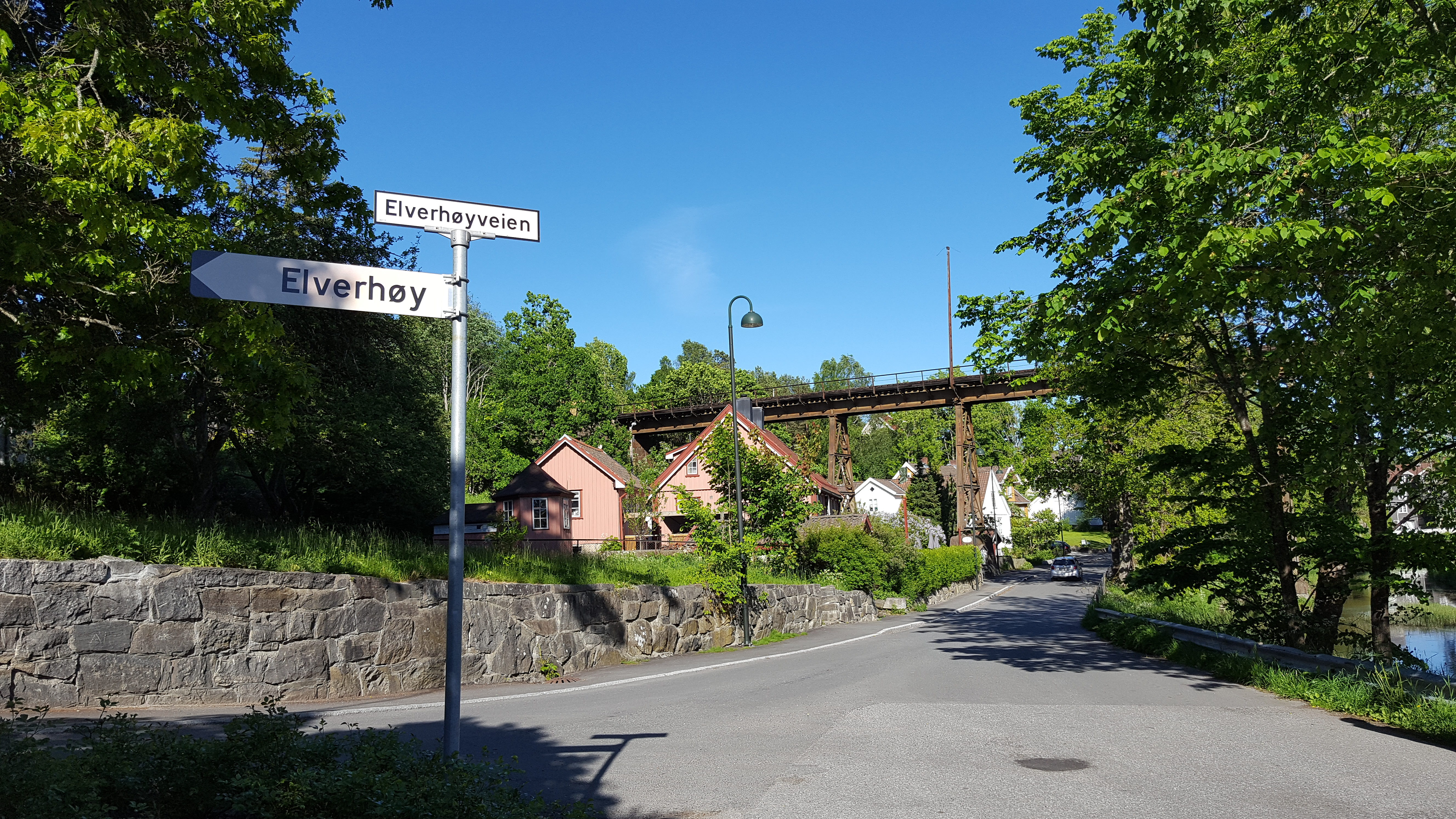 Bilde fra Hølen med den gamle jernbanebrua i bakgrunnen